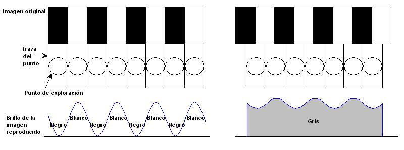 La resolución vertical equivale al número activo de lineas cuando la estructura de exploración está centrada en los detalles de la imagen (izquierda). Se produce una pérdida de resolución vertical cuando el punto de exploración abarca varios detalles (derecha).